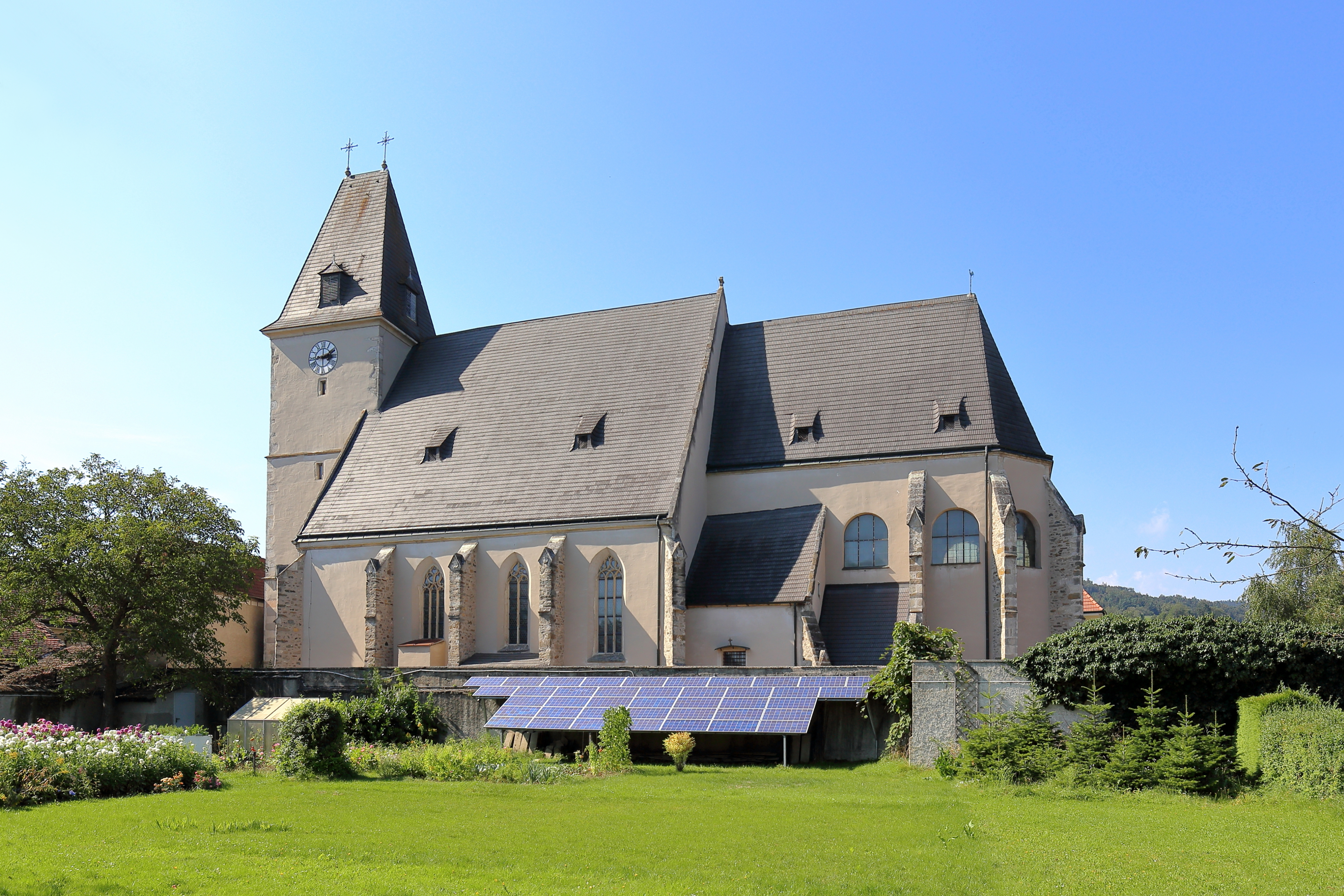 Südostansicht der Wall- und Pfarrkirche Maria Heimsuchung in Maria Laach am Jauerling, eine niederösterreichische Marktgemeinde in der Wachau.Eine spätgotische Staffelkirche mit einem dreigeschossigen Westturm aus dem Ende des 15. Jahrhunderts und einem zweijochigen Chor aus dem Anfang des 15. Jahrhunderts.